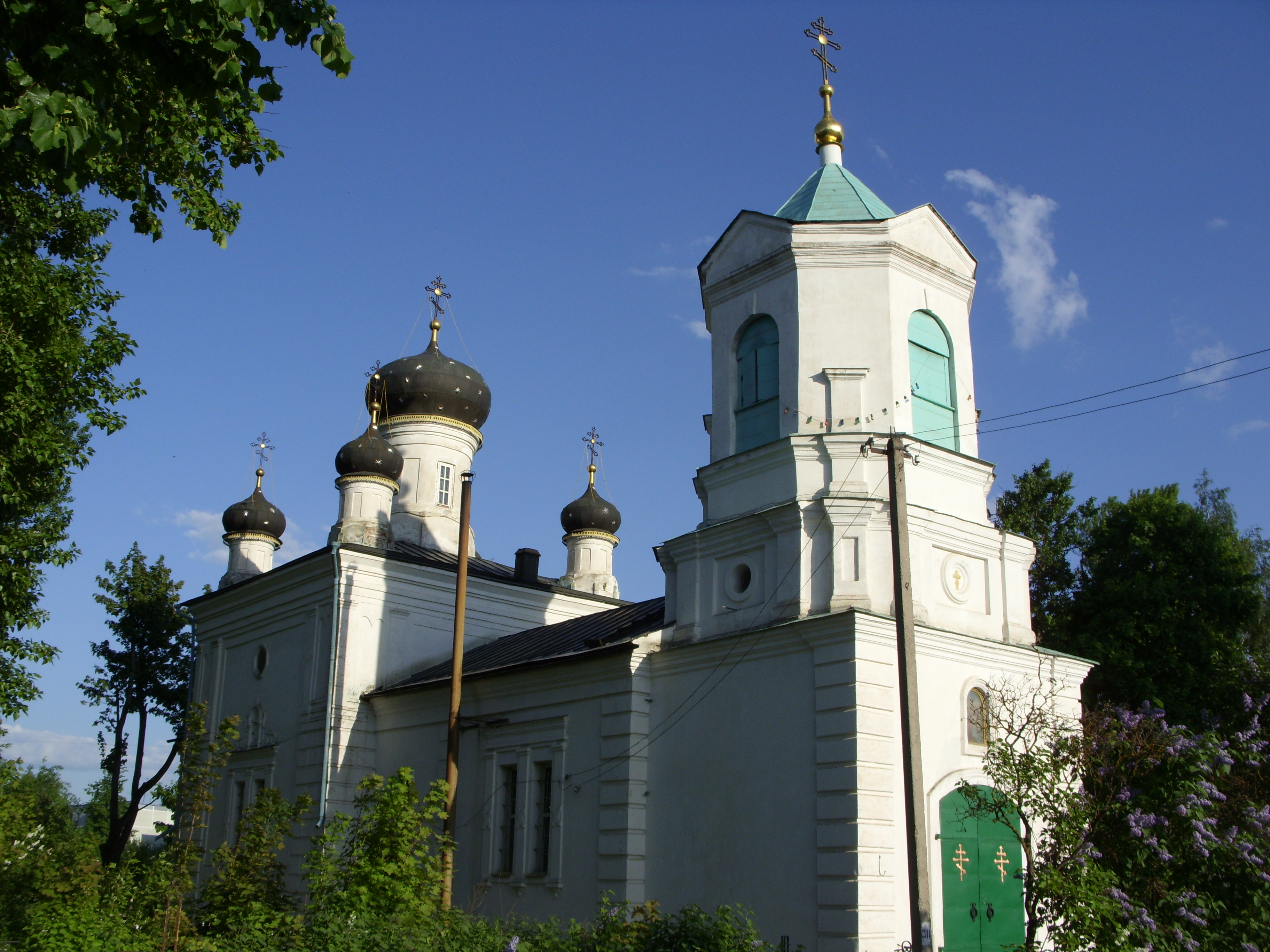 Троицкая церковь (1850-е). Город Невель, Псковская область.